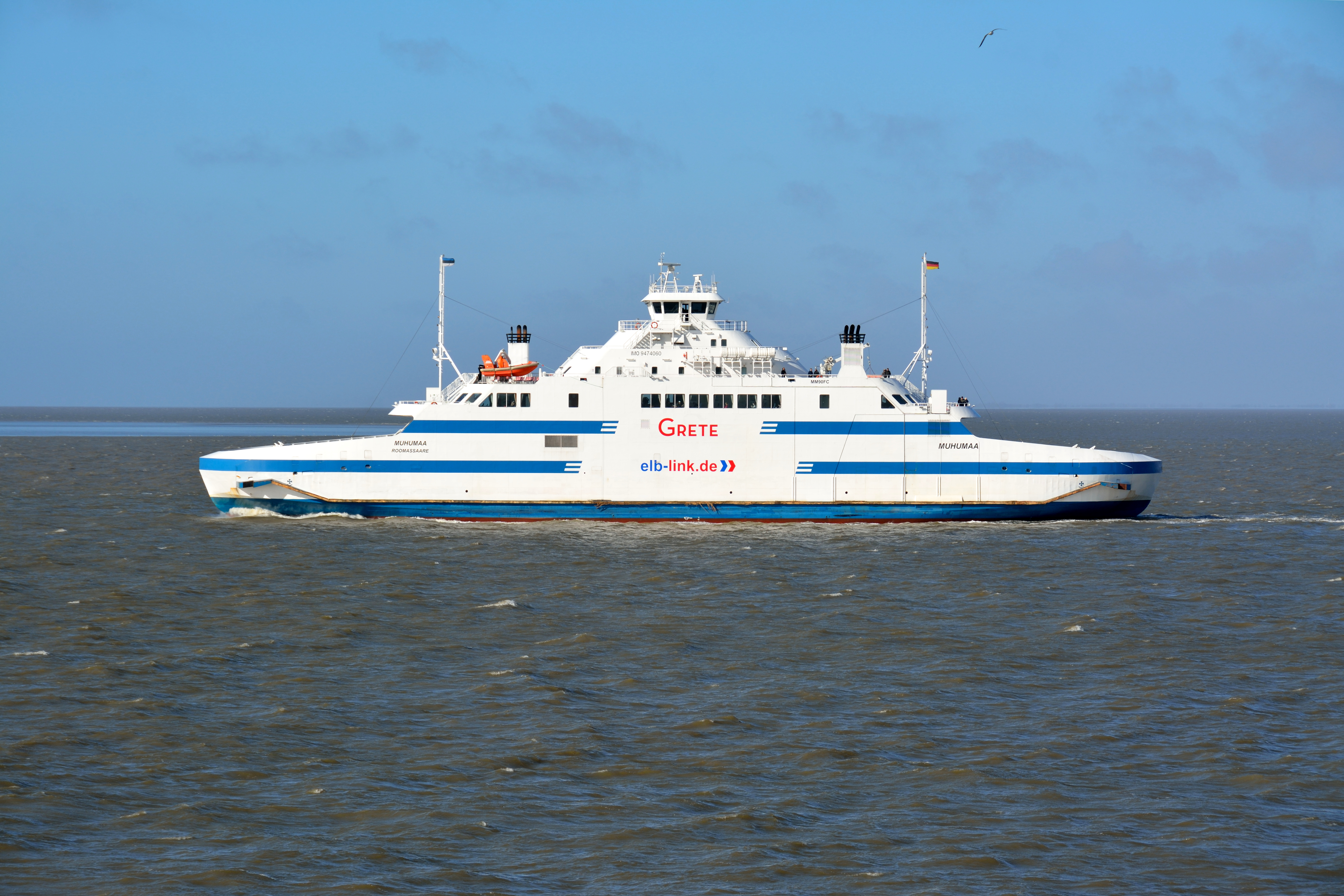 Das Fährschiff "Grete" der Elb-Link Reederei auf der Elbe. IMO 947060